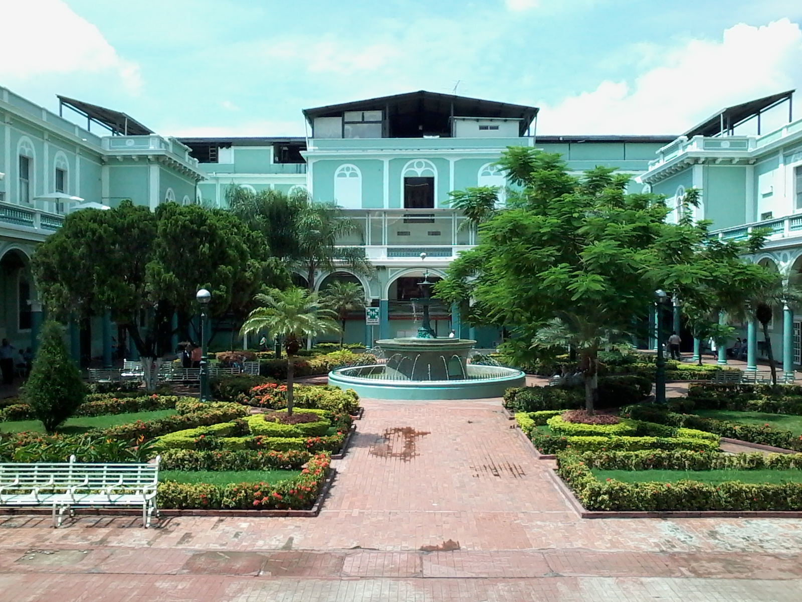 Vista interior del patio del Hospital Luis Vernaza